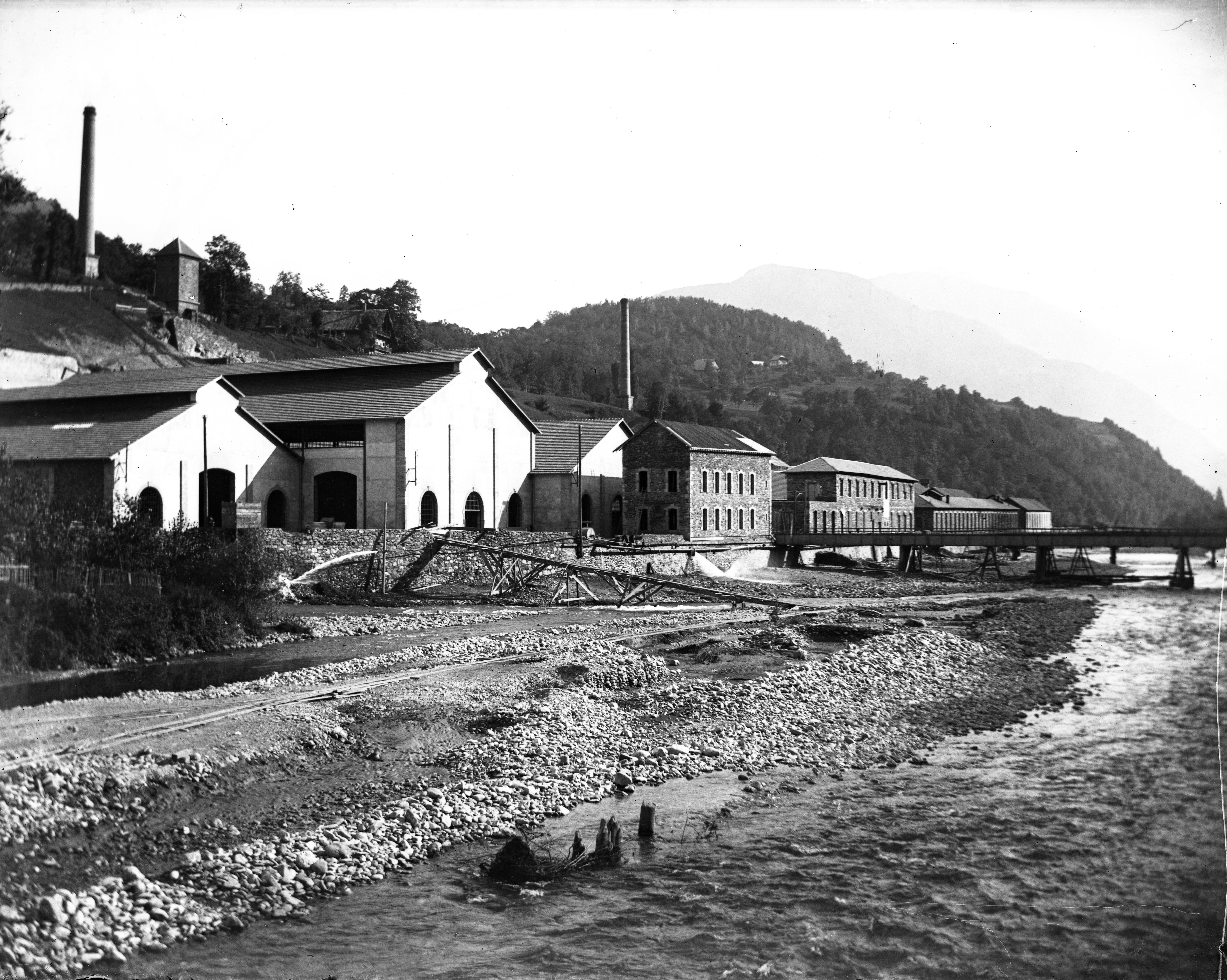 photo